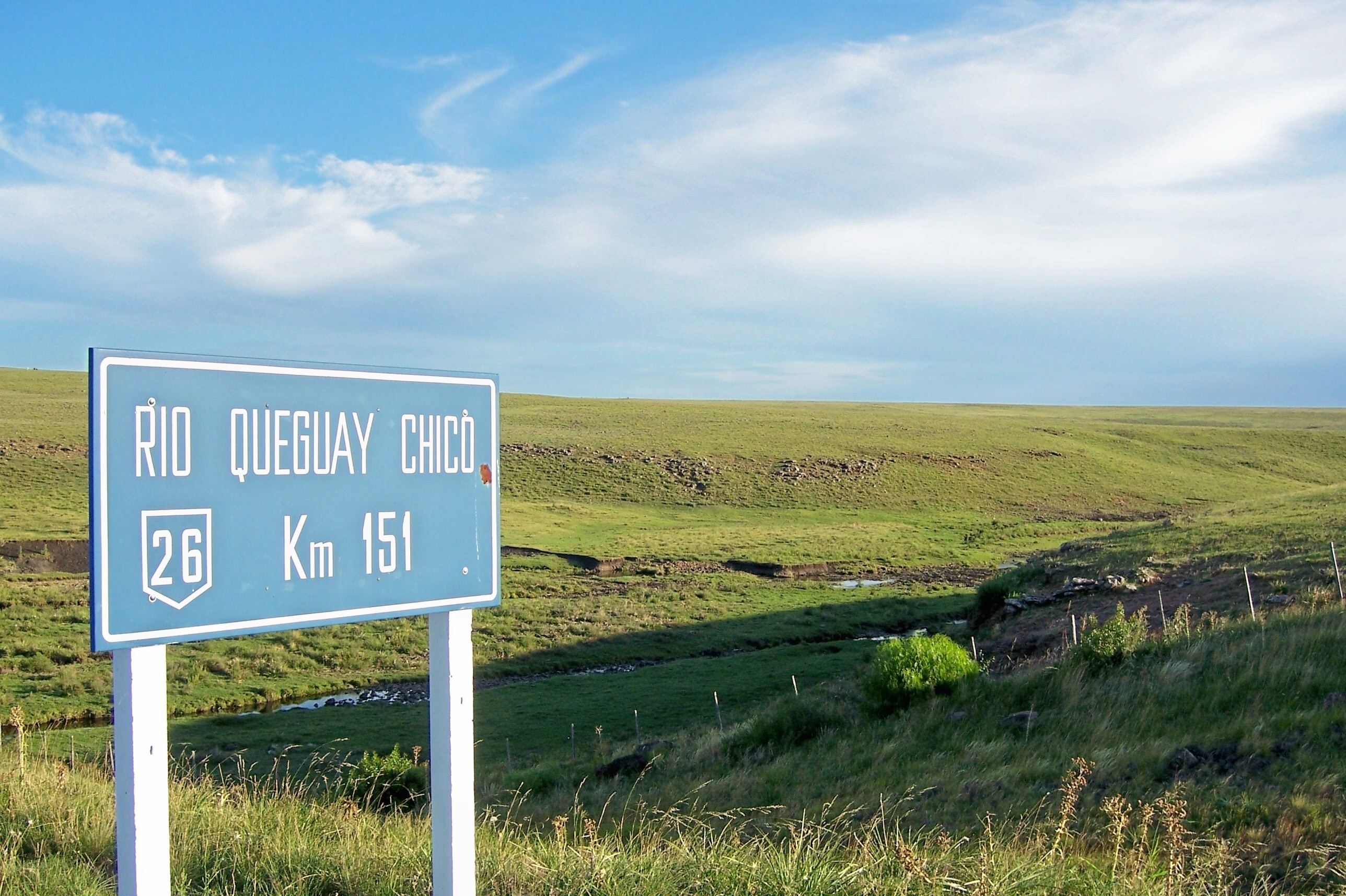 Vista del Río Queguay Chico (Uruguay) a la altura de su intersección con la Ruta nacional N° 26 (km 151). La cámara apunta en dirección sureste; continuando hacia el este se llega a Tacuarembó, y en este punto el río corre de norte a sur (derecha de la imagen).